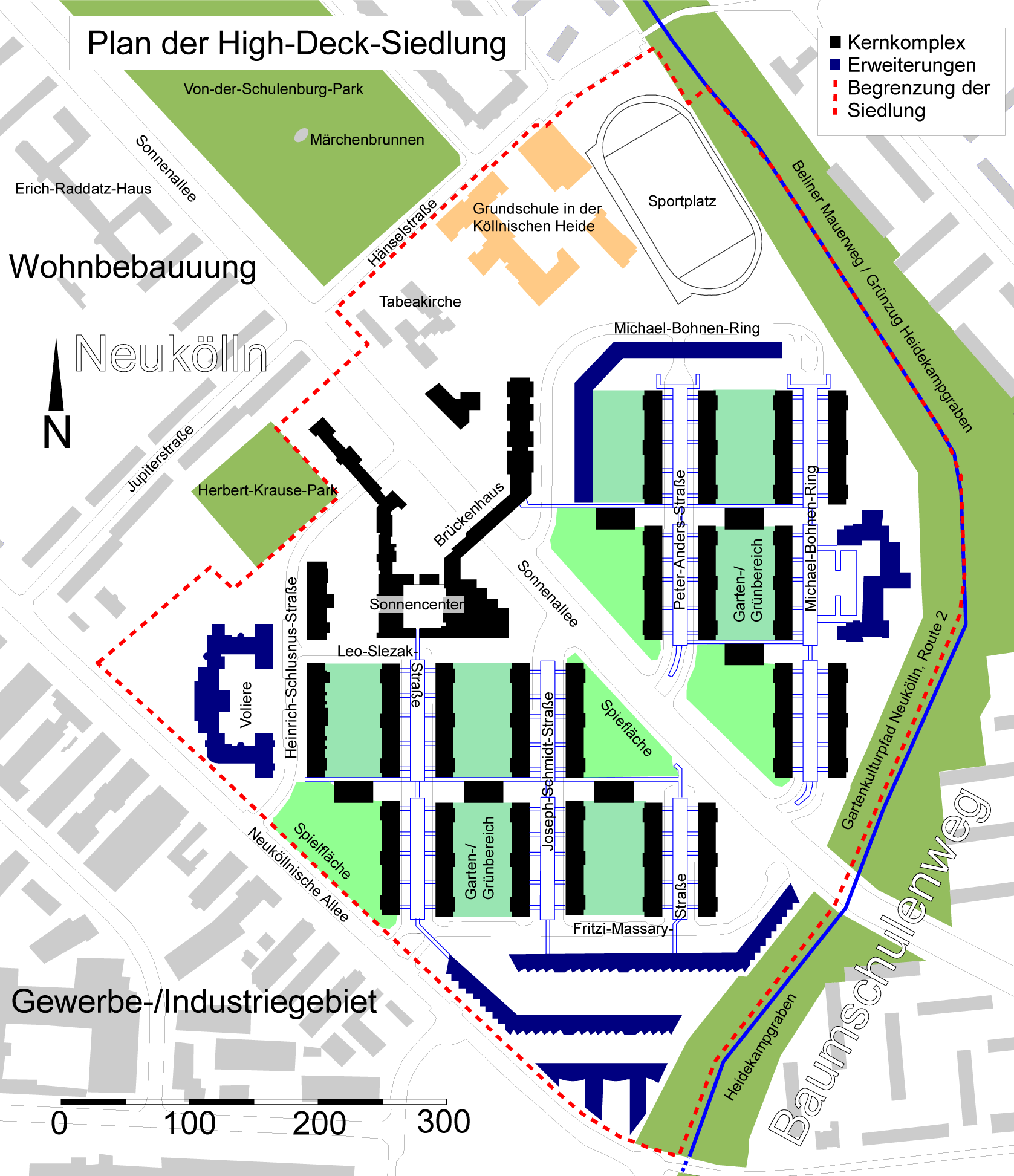 Berlin: Lage- und Übersichtsplan der High-Deck-Siedlung